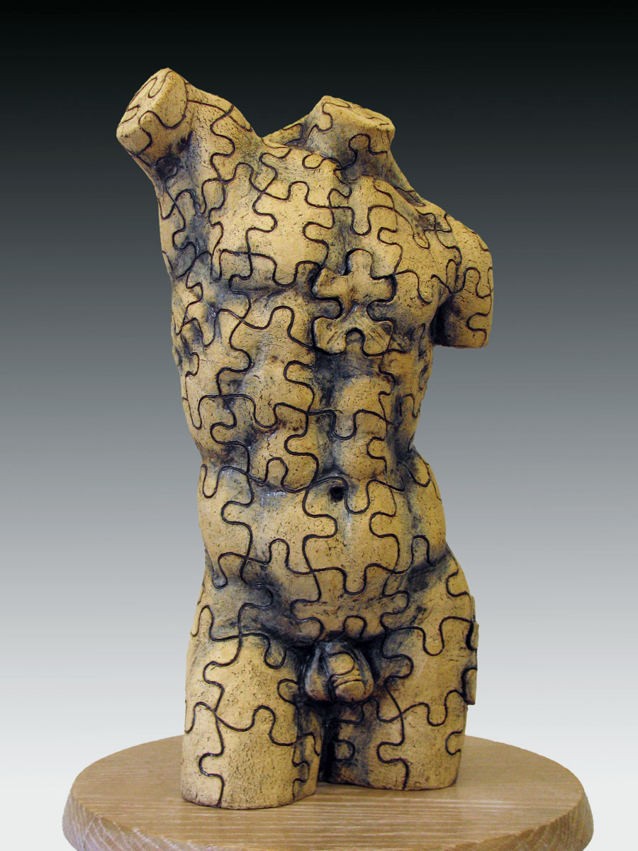 Permanent Collection ASU Art Museum, Ceramic Research Center, Arizona. Title: Torso-Puzzle - No Game / Contrapposto Games series Date: 2011 Author: Carlos Enrique Prado Herrera Technique: Ceramic. Stoneware, oxides, and glazes. Reduction fired, Cone 6. Dimensions: 18 x 10 x 6 inches